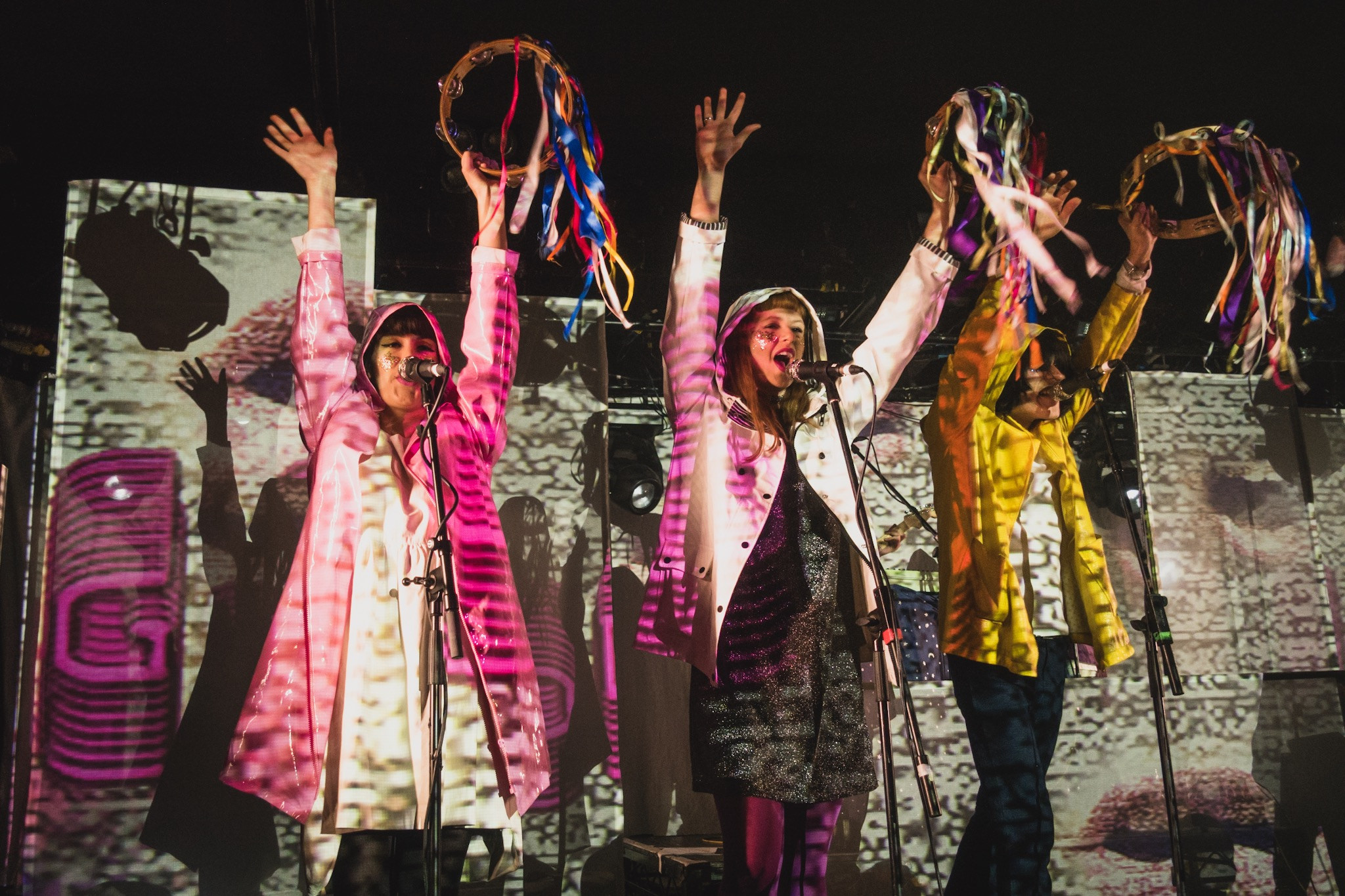 Superorganism